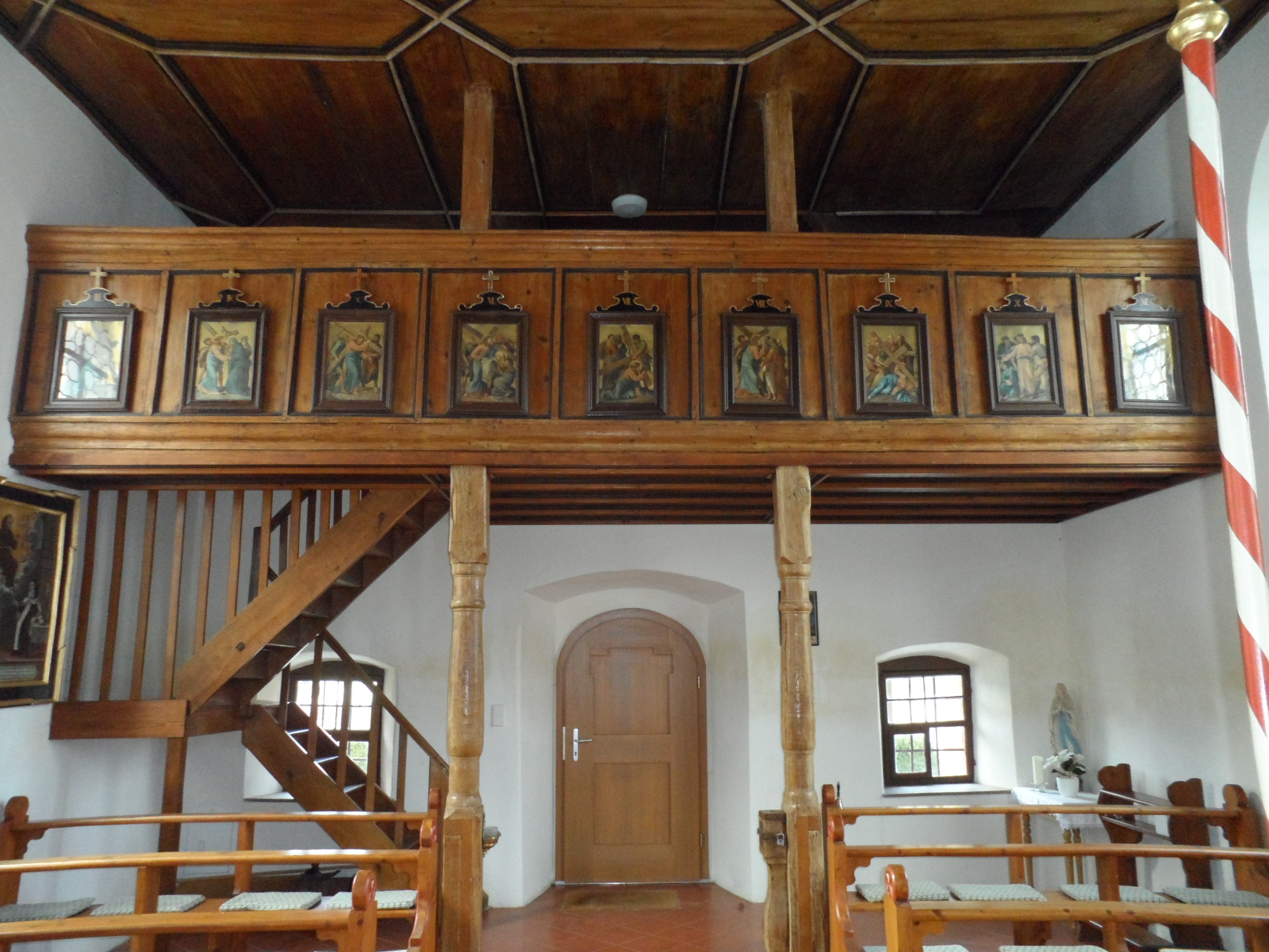 Kapelle St. Jakobus: Blick auf die Empore und die zwei verzierten Turmtrag-Säulen.